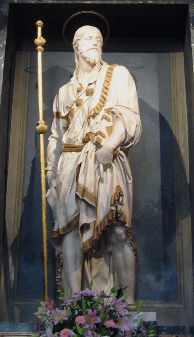 São Tiago Maior